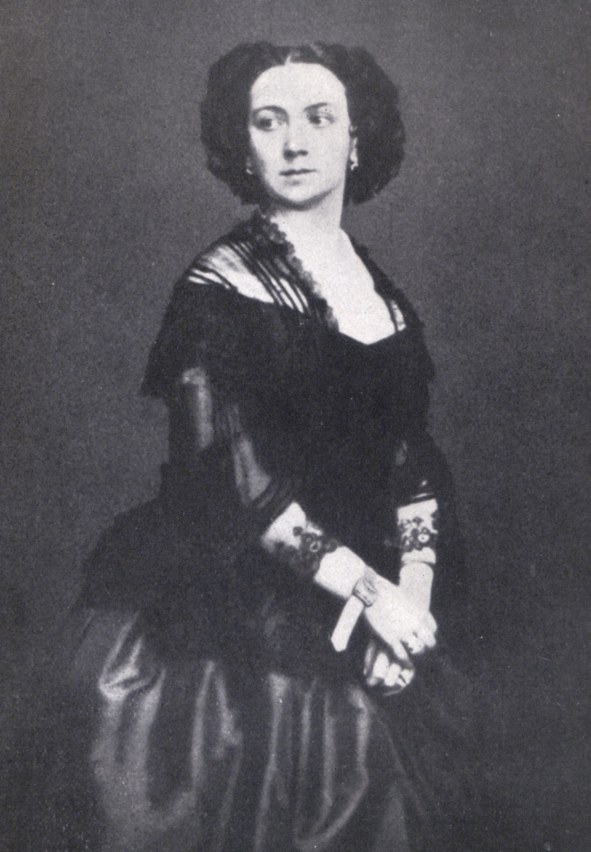 Porträt der Tänzerin Maria Taglioni